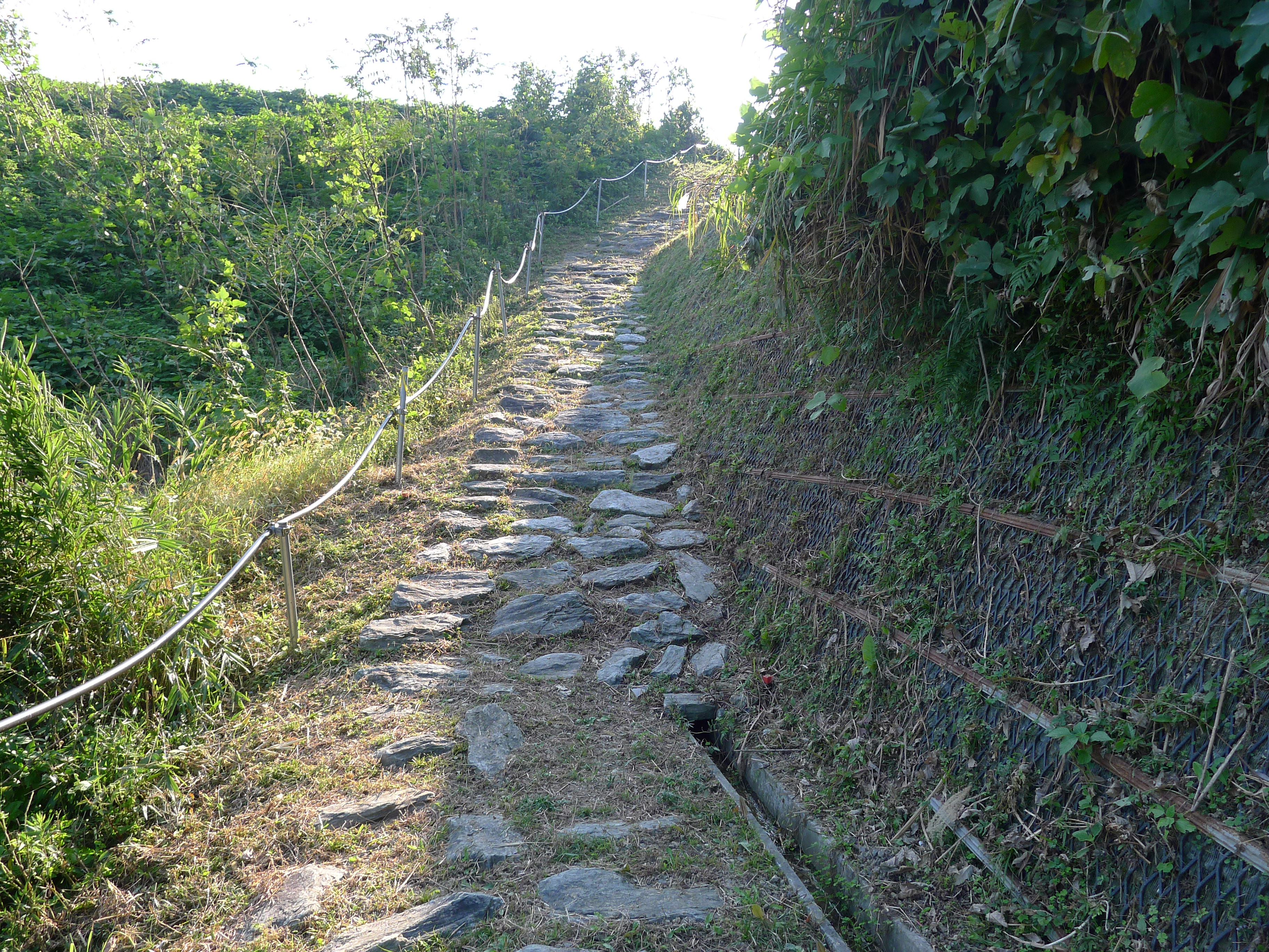 熊野古道・紀伊路の石畳（和歌山県海南市）